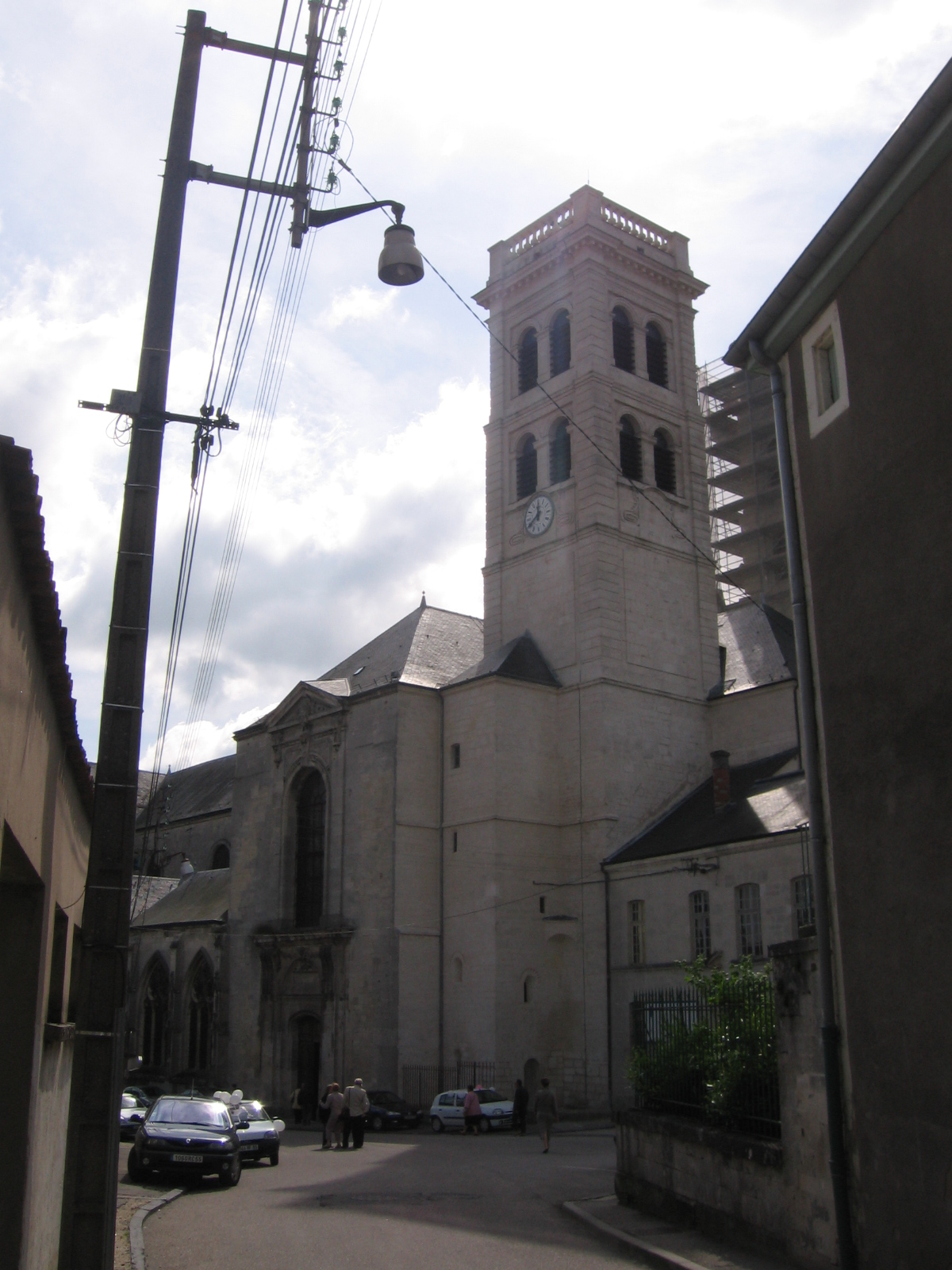 Verdun